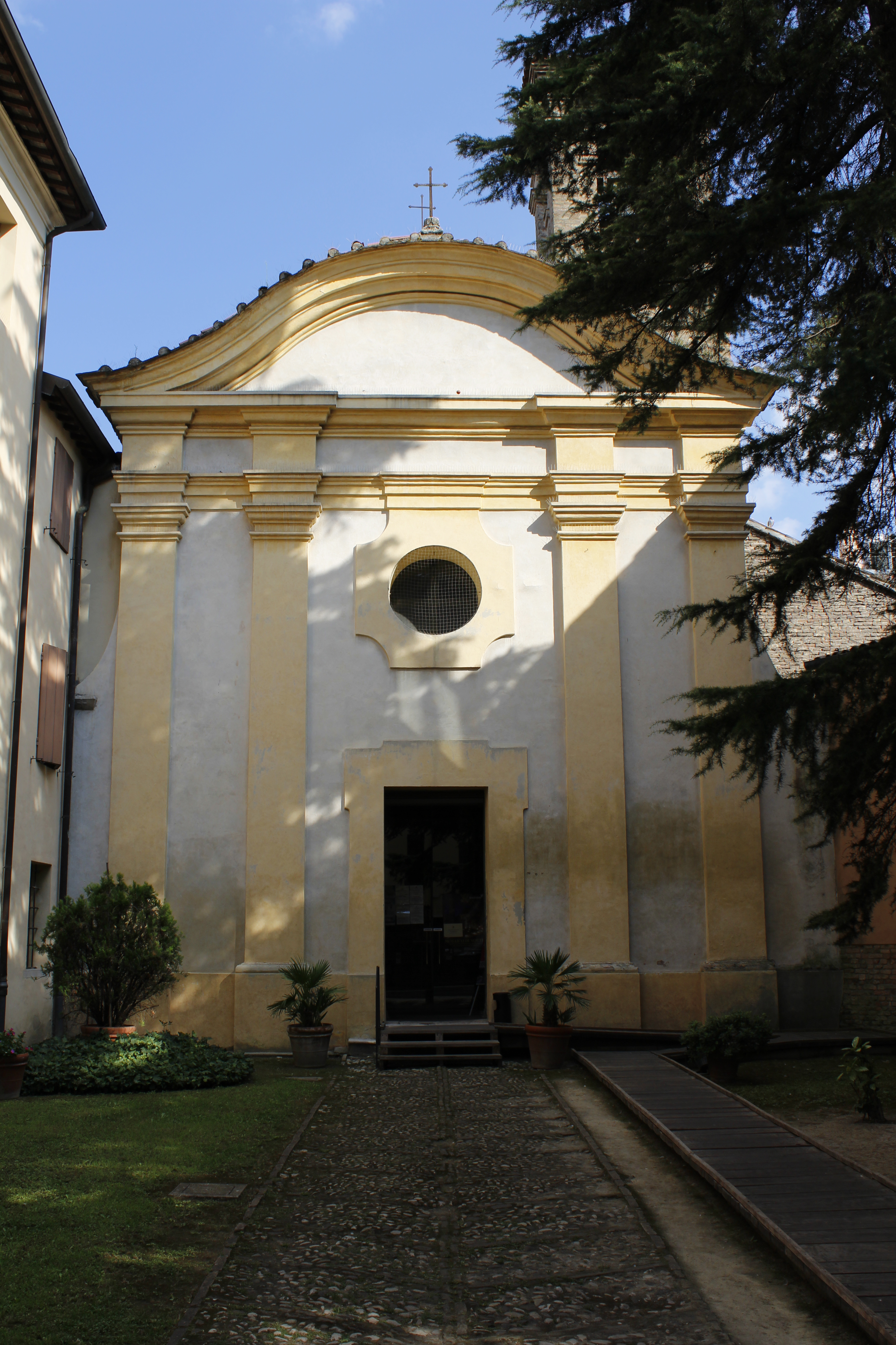 Sant'Eufemia, Ravenna